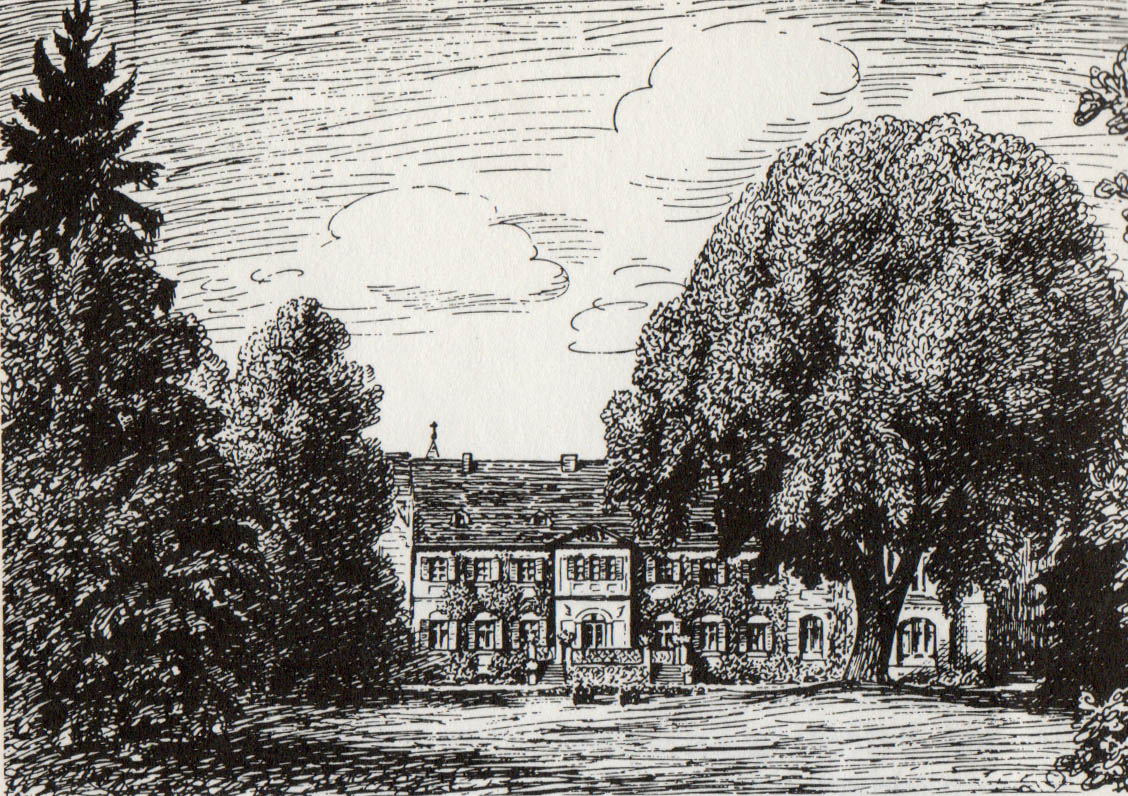 Herrenhaus mit Park JAHNSFELDE